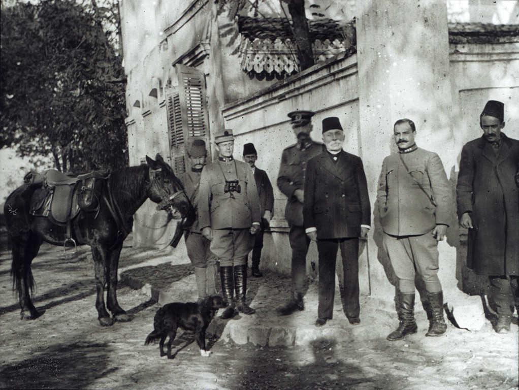 DMM E04 Group of men. From left to right: 2. Meleq Frashëri, 4. General De Veer, 5. Turhan Pasha Përmeti, 6. Et’hem Vlora. December 1913 (Photo: Thomson). / Grup figurash. Nga e majta në të djathtë: 2. Meleq Frashëri, 4. Gjenerali De Veer, 5. Turhan pashë Përmeti, 6. Et’hem Vlora. Dhjetor 1913 (Foto: Thomson).